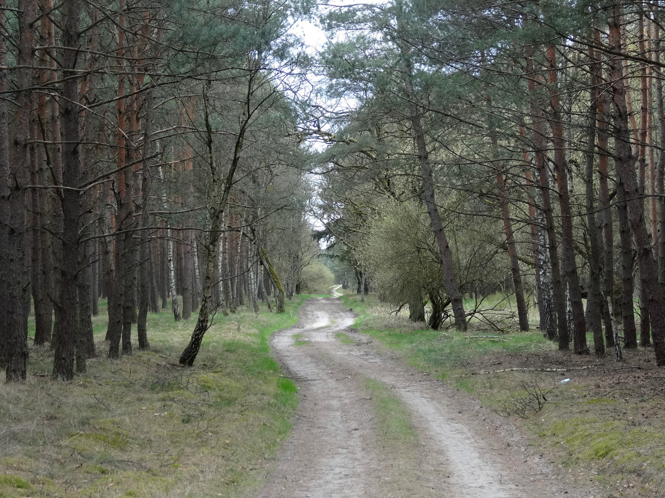 Zanikła wieś Łażyn w Puszczy Bydgoskiej, gmina Nowa Wieś Wielka - dawna droga wiejska